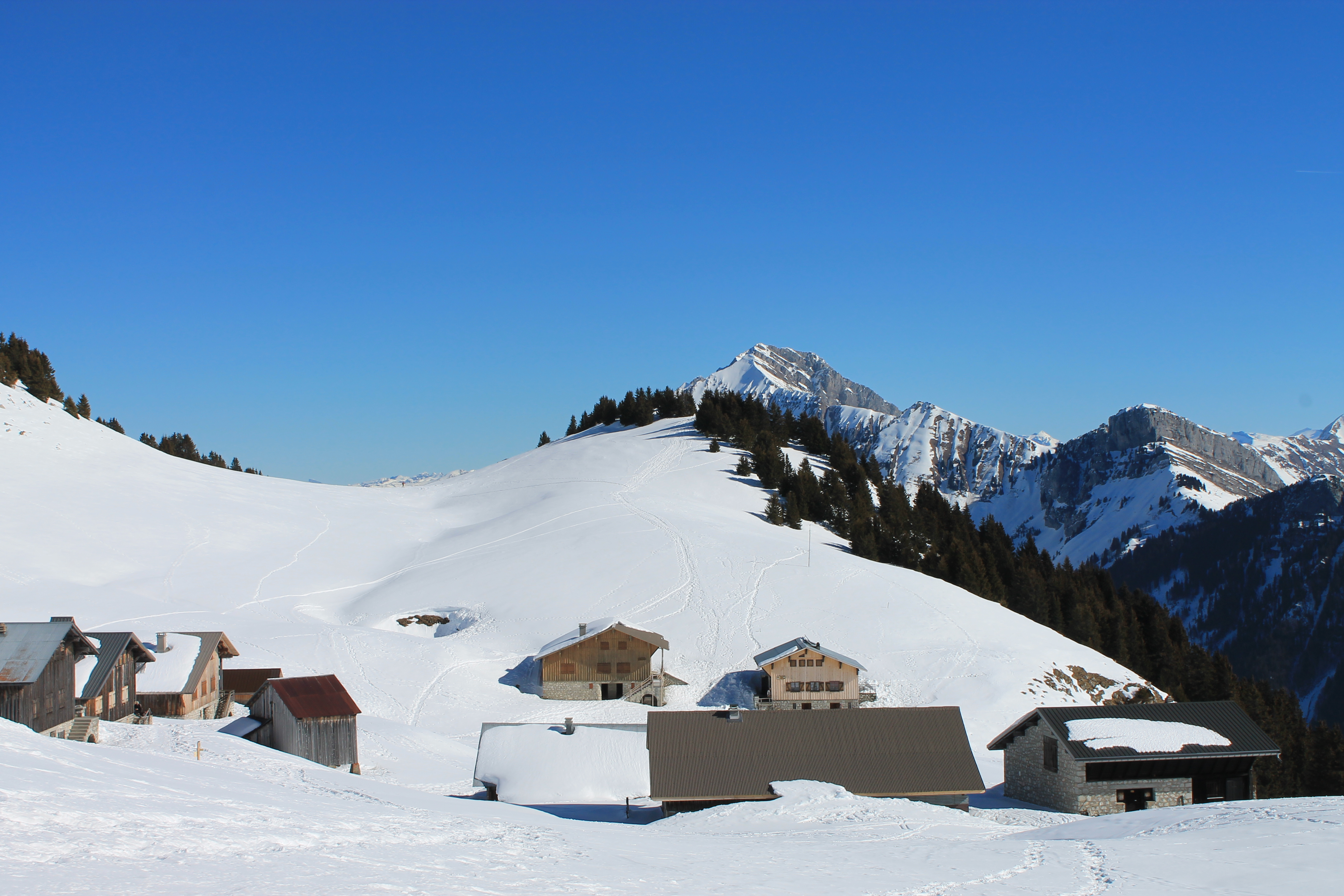 chalets sur le plateau des Auges